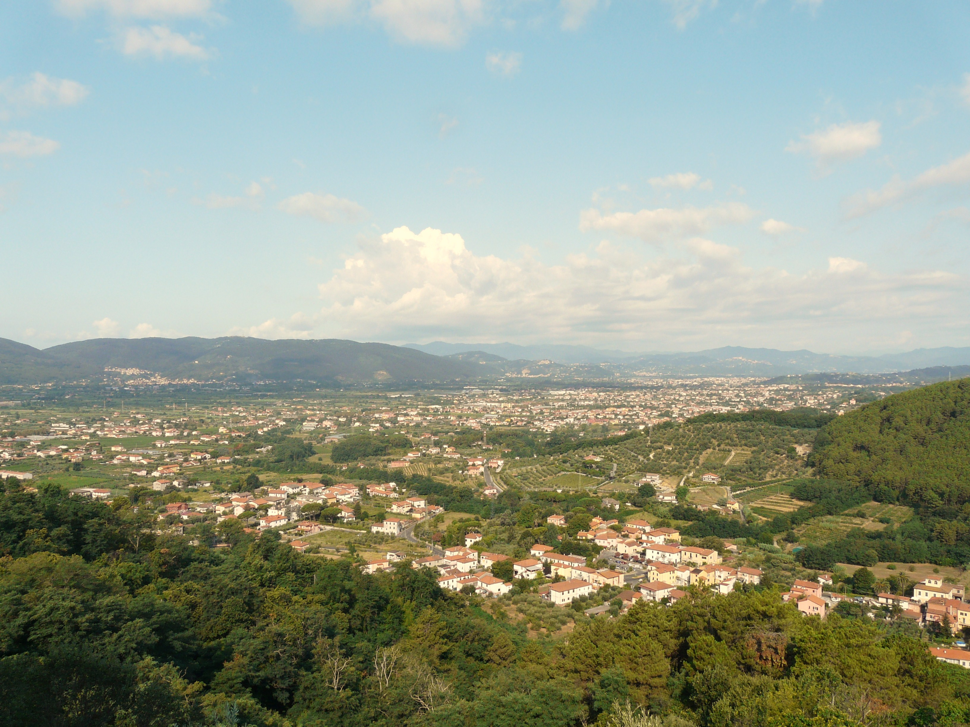 Piana di Sarzana, Liguria, Italia